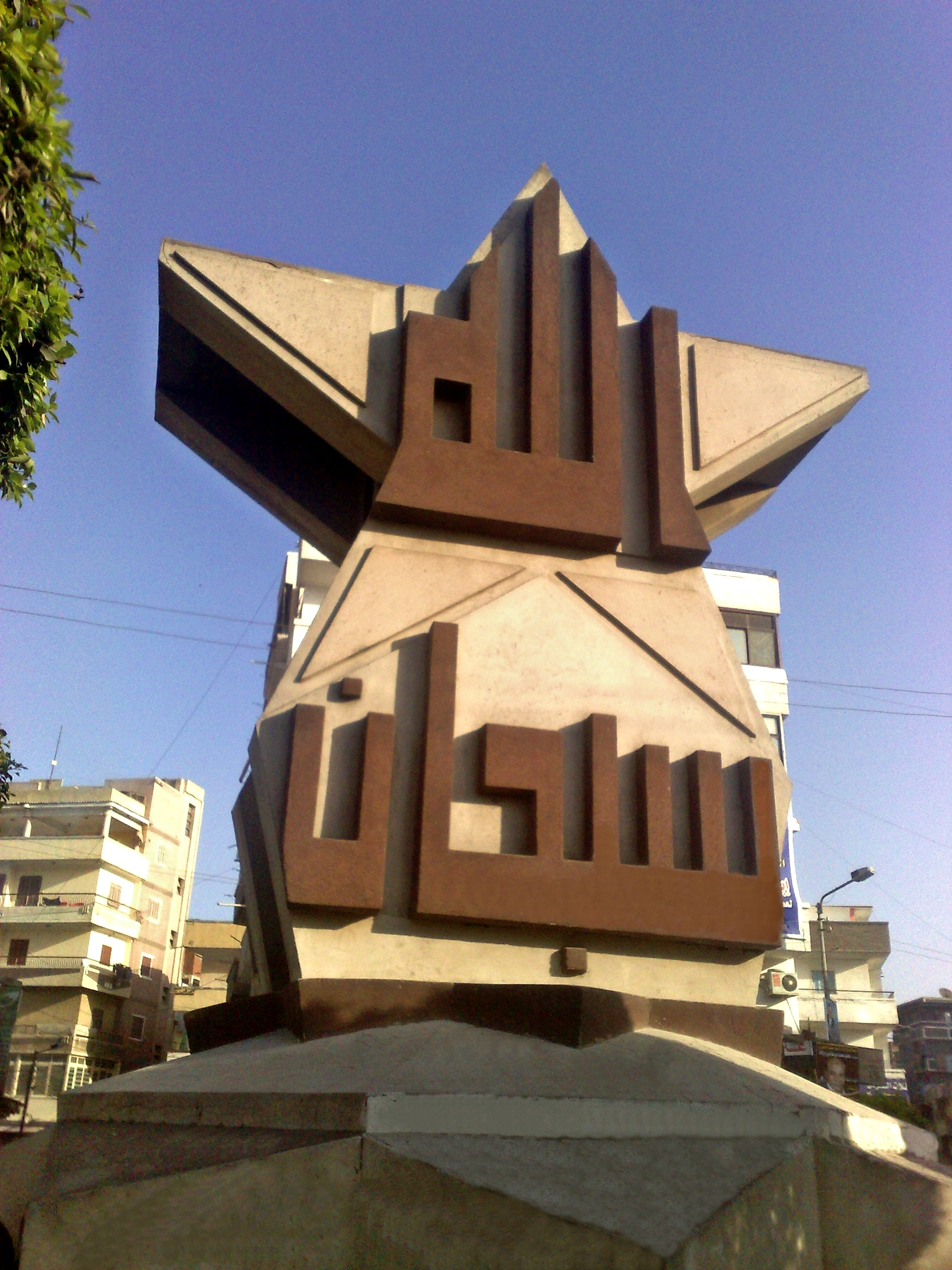 نصب تذكاري مكتوب عليه "سبحان الله" أمام المسجد الإبراهيمي، دسوق